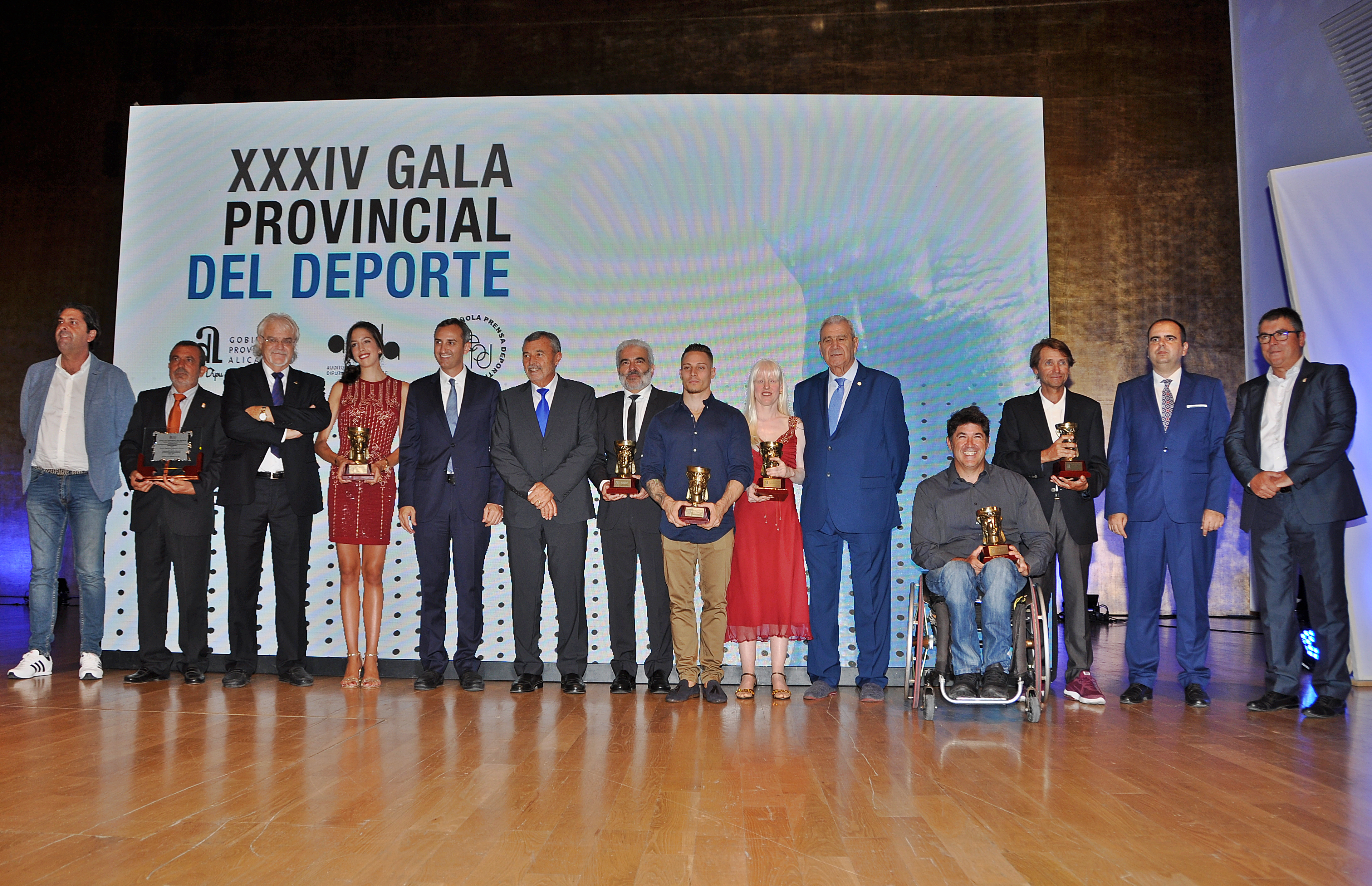 Premiados y representantes políticos en la XXIV Gala Provincial del Deporte de Alicante celebrada el 22 de septiembre de 2017, donde se reconoció a lo mejor del deporte alicantino de 2016. De izquierda a derecha: Fernando Sepulcre (diputado), Fernando Corral (presidente de Automóvil Club de Alicante), José García Carratalá (secretario de la Asociación de la Prensa Deportiva de Alicante), Alejandra Quereda, César Sánchez (presidente de la Diputación), Pascual Díaz (diputado de Deportes), Juan Pozuelo (entrenador de Judo Club Alicante), Néstor Abad, Sara Luna, Rafael Rodríguez (presidente de la Asociación de la Prensa Deportiva de Alicante), Llorenç Solbes (entrenador de atletismo), Thomas Artigas, Carlos Giménez Bertomeu (diputado) y Lluís Miquel Pastor (diputado).